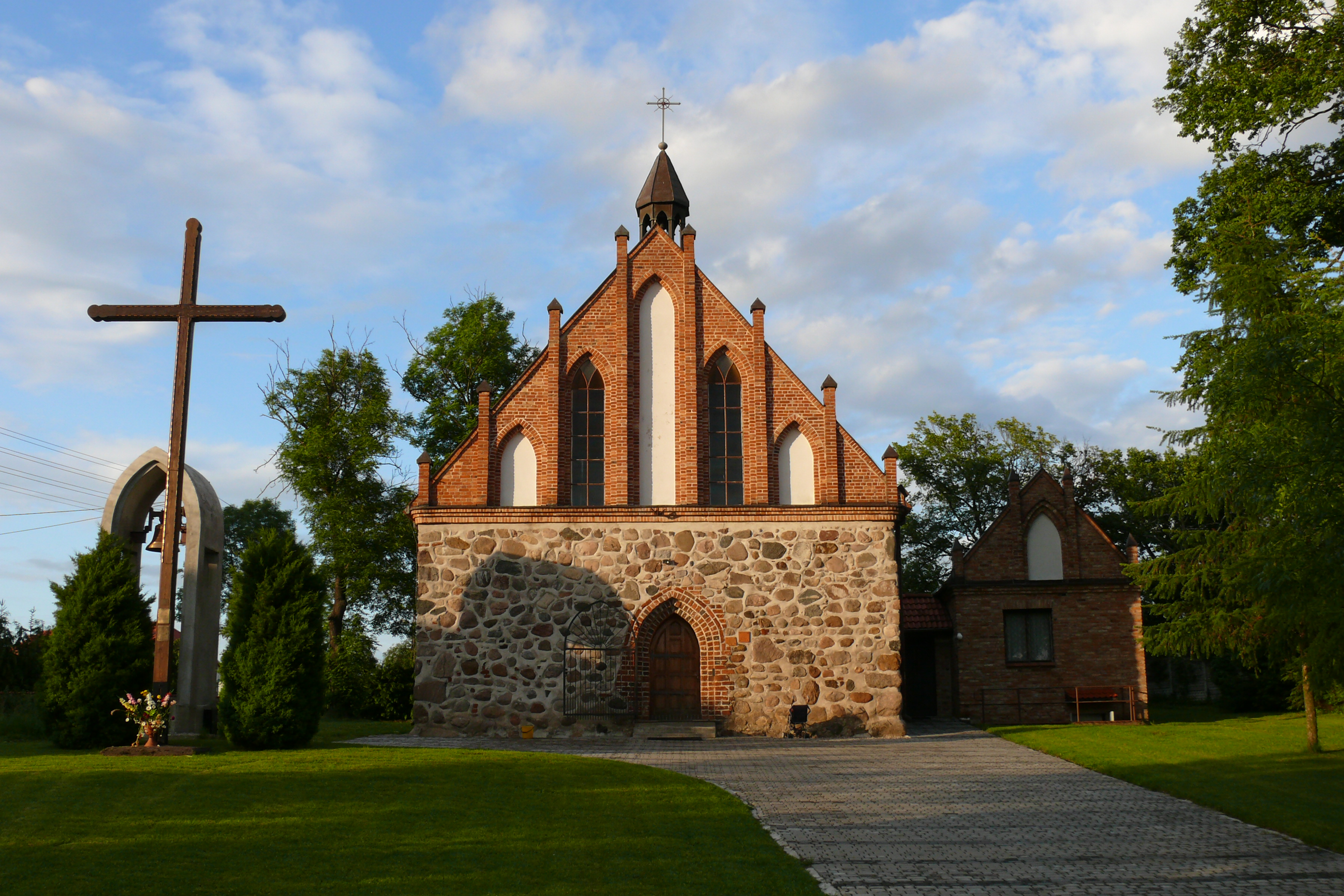 Kościół filialny p.w. Narodzenia NMP w Klępinie (zabytek nr rejestr. 1111)